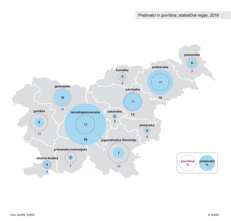 Prebivalstvo in površina, statistične regije, 2016